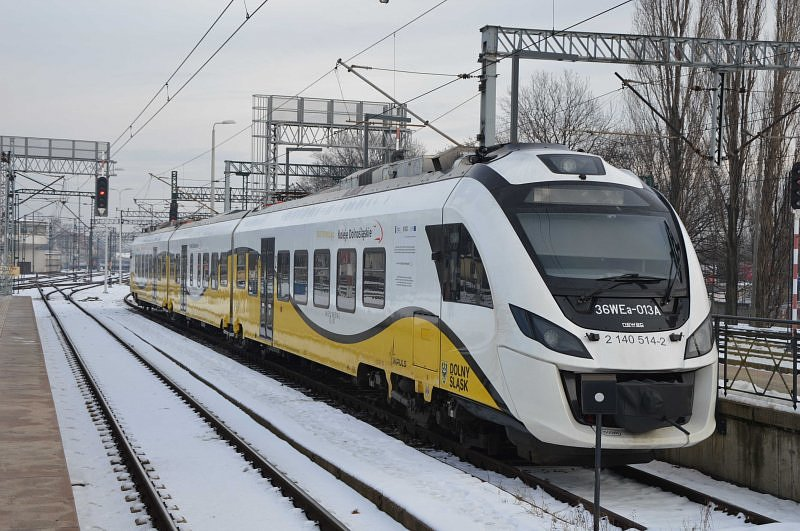 Elektryczny zespół trakcyjny Newag Impuls 36WEa-013 należący do Kolei Dolnośląskich stoi na stacji Wrocław Główny.